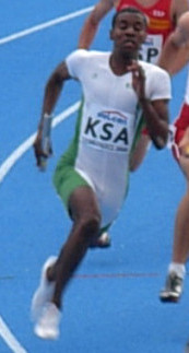 Mistrzostwa Świata Juniorów w Lekkiej Atletyce Bydgoszcz 2008